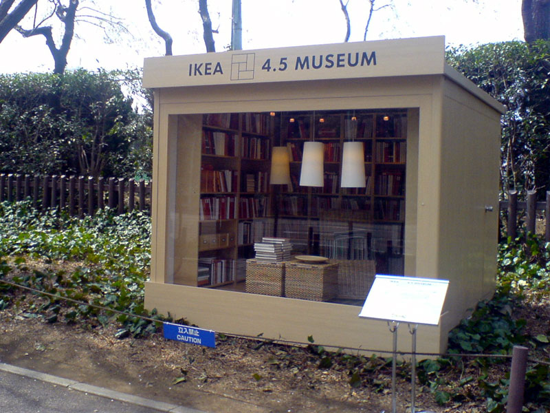 IKEA 4.5 Museum in Jingu-Gaien